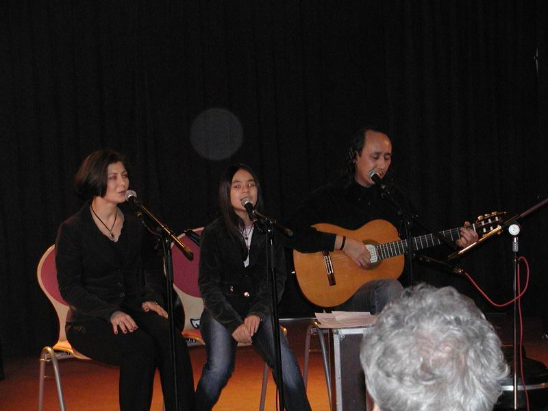 la esperantlingva kantista duopo Ĵomart kaj Nataŝa, kun sia kantista filino Carina (centre), en decembro 2005 dum NR